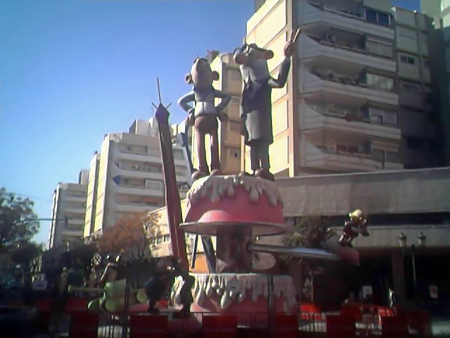 Falla valenciana con Mortadelo y Filemón